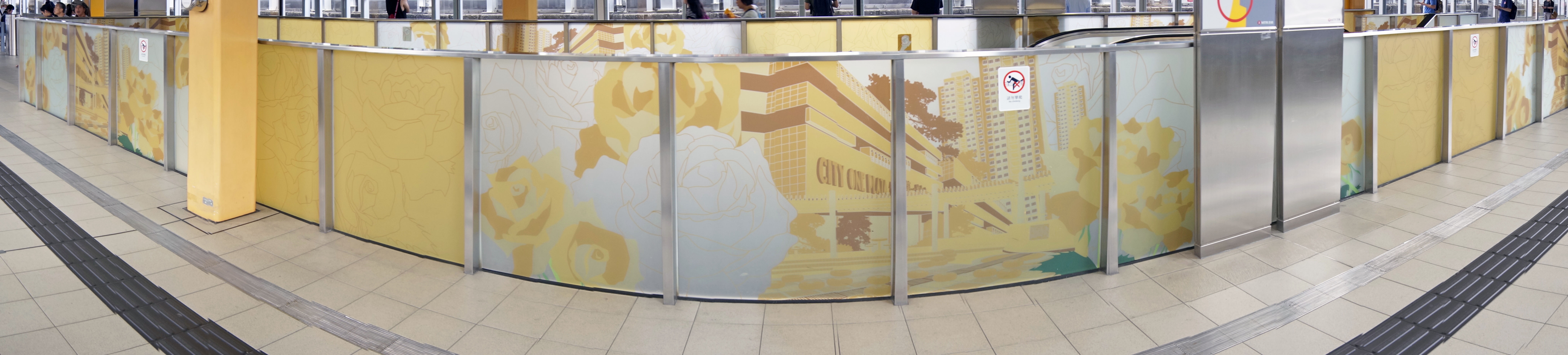 港鐵第一城站月台佈置全景圖